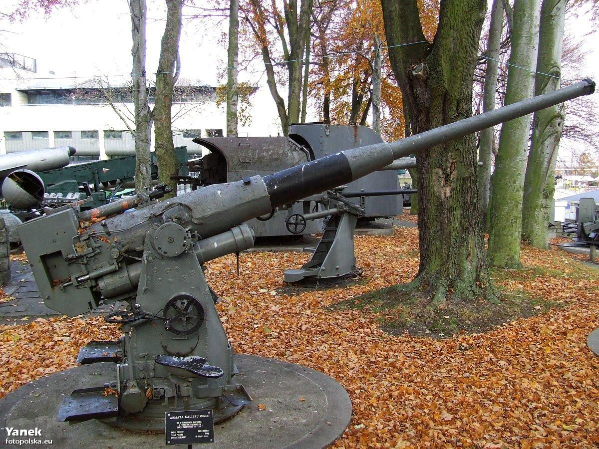 Armata wz B-24 kal 100mm z powojennego uzbrojenia okrętu podwodnego ORP Sęp.